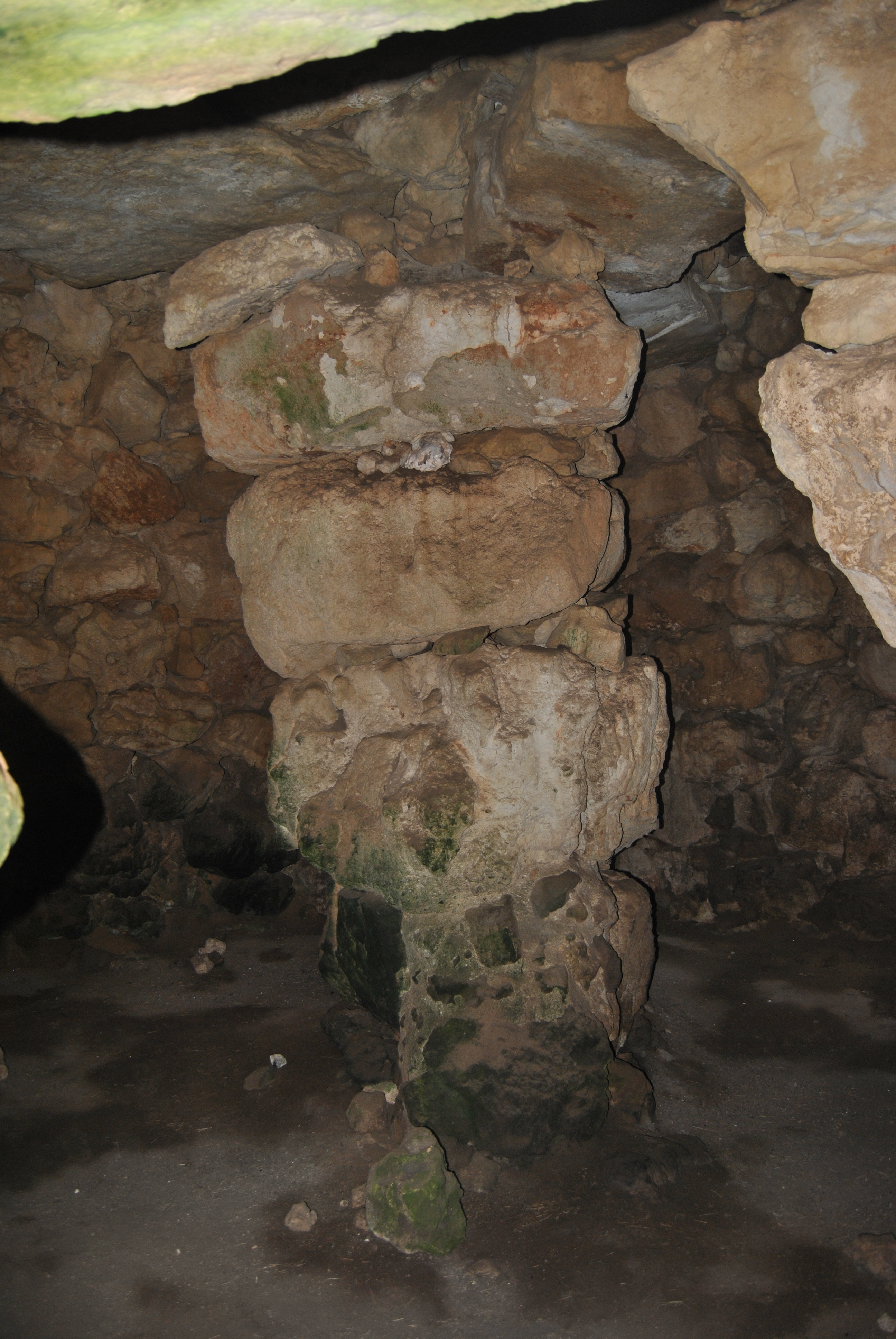 Interior del talaiot de Ses Bigues de Mata amb una columna polilítica